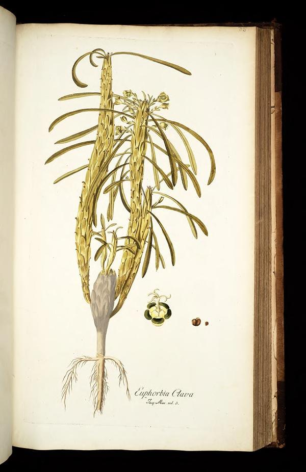 Icones plantarum rariorum